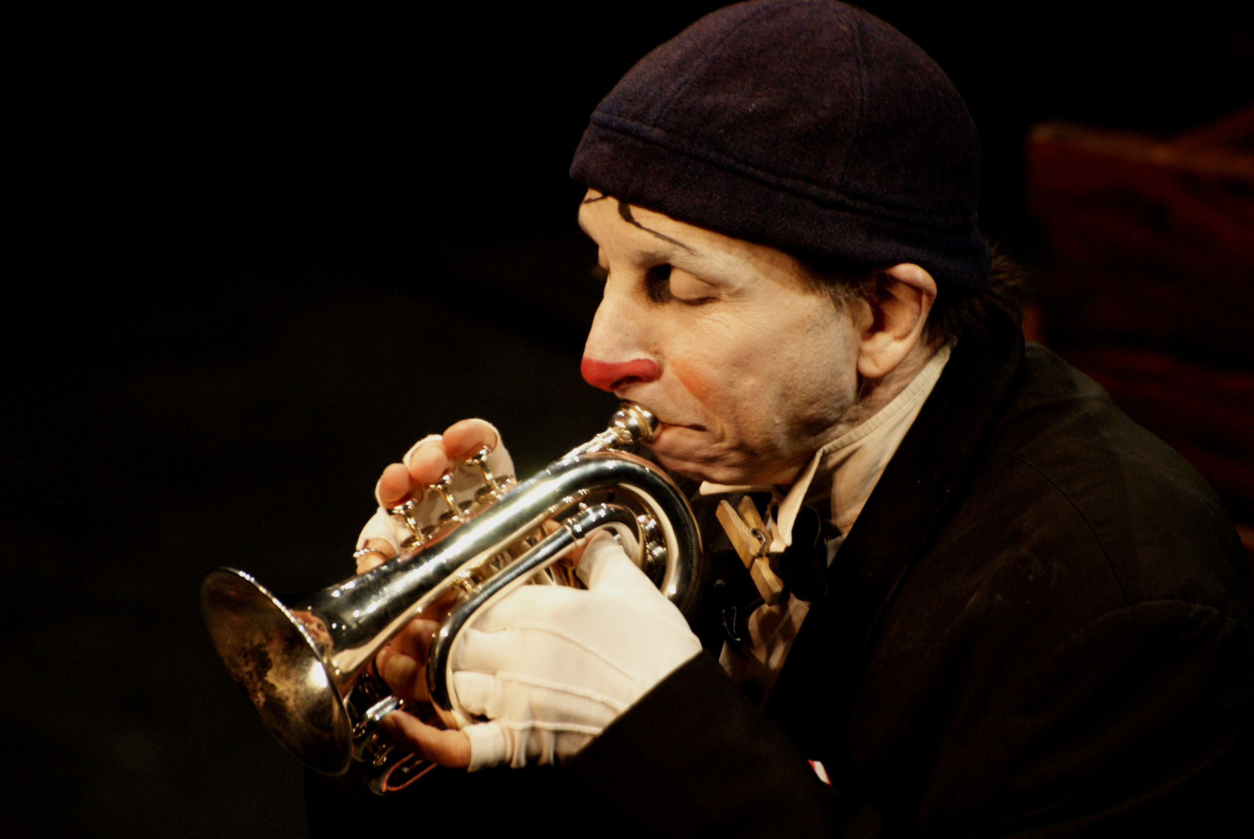 Howard Buten fête les 30 ans de Buffo le clown avec Spontanéous